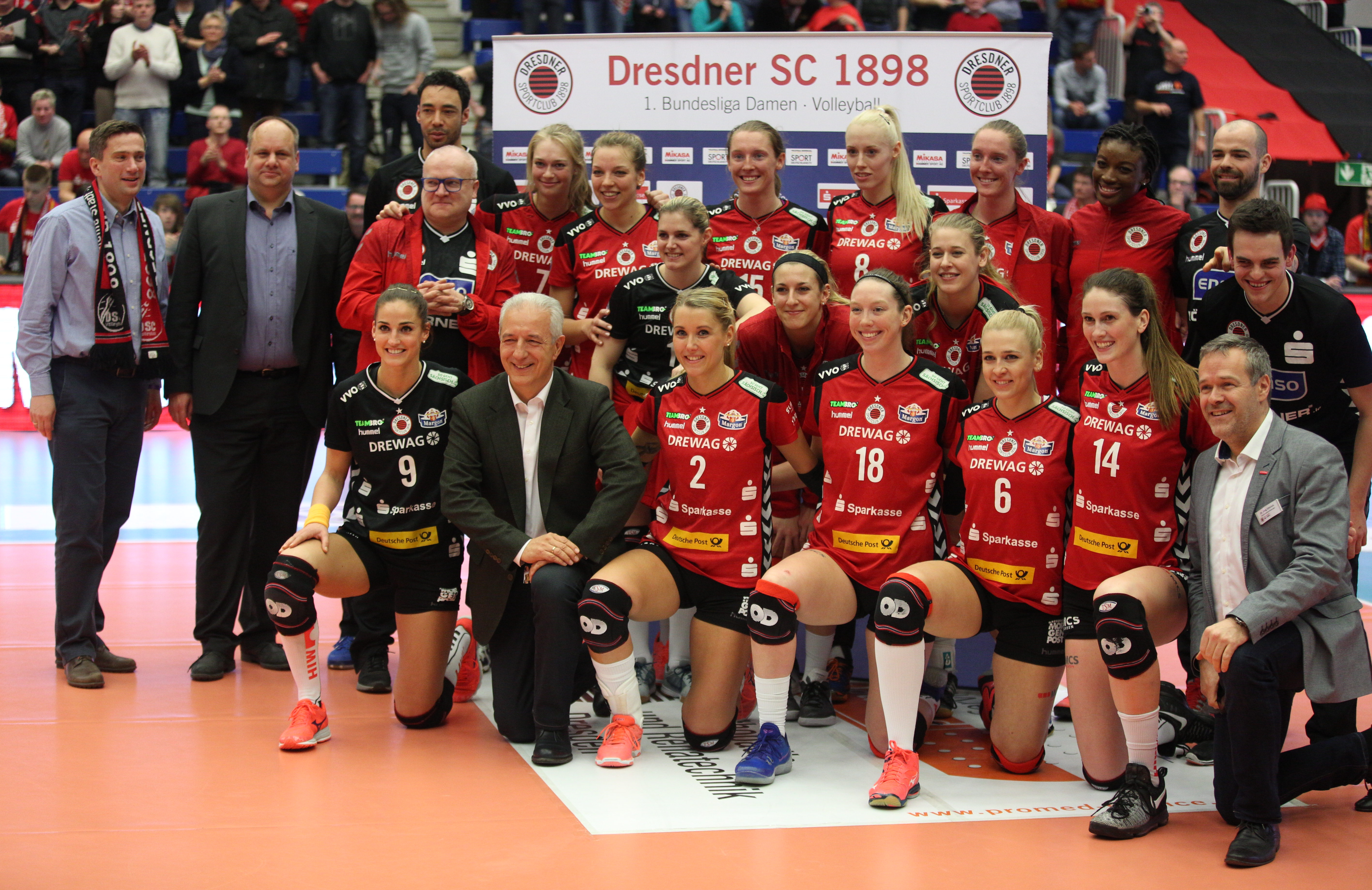 Mannschaftsfoto des Dresdner SC mit Martin Dulig, Dirk Hilbert und Stanislaw Tillich beim Play-off-Viertelfinale Dresdner SC gegen Rote Raben Vilsbiburg, 18. März 2017